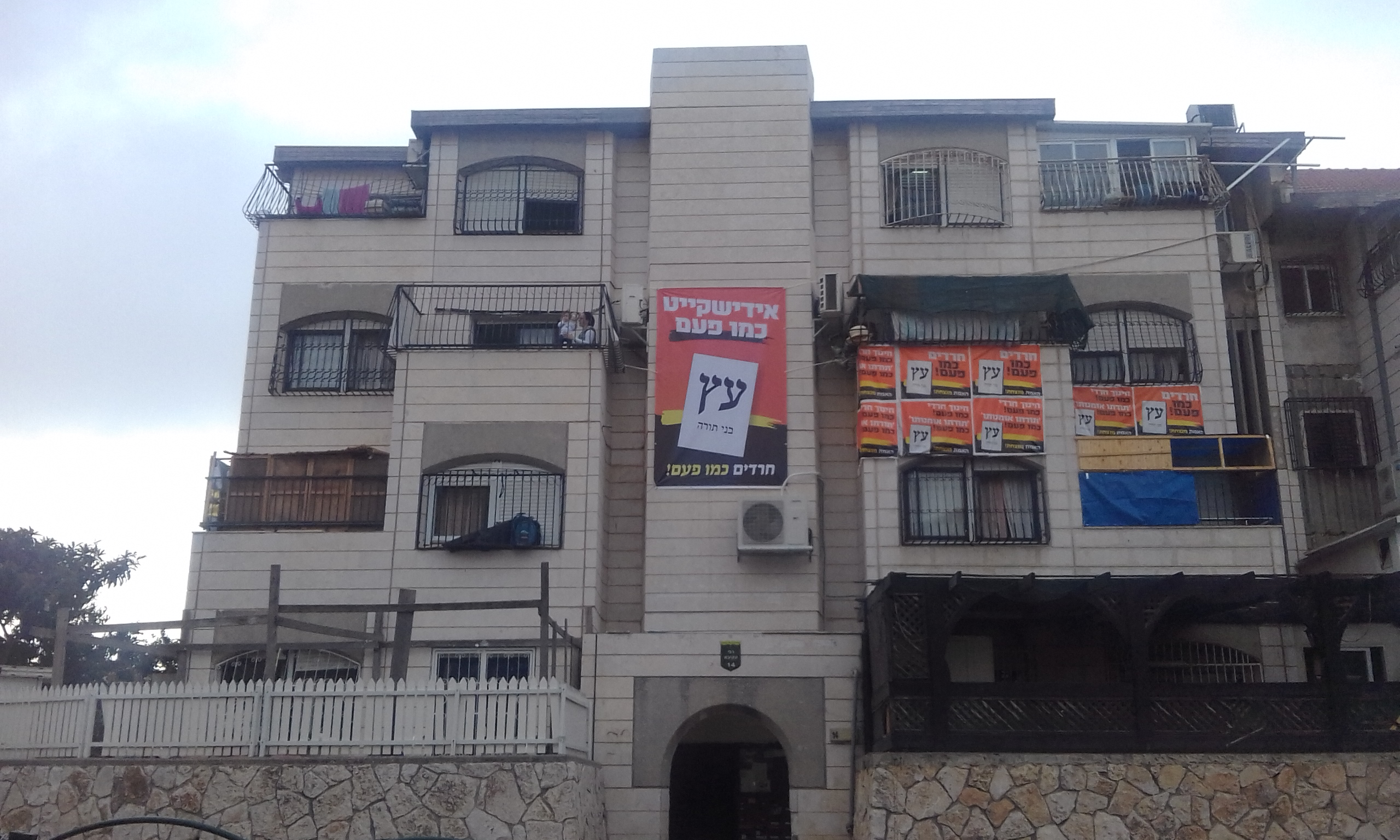 קמפיין מפלגת עץ בני תורה בביתר עילית בבחירות לעירייה 2018